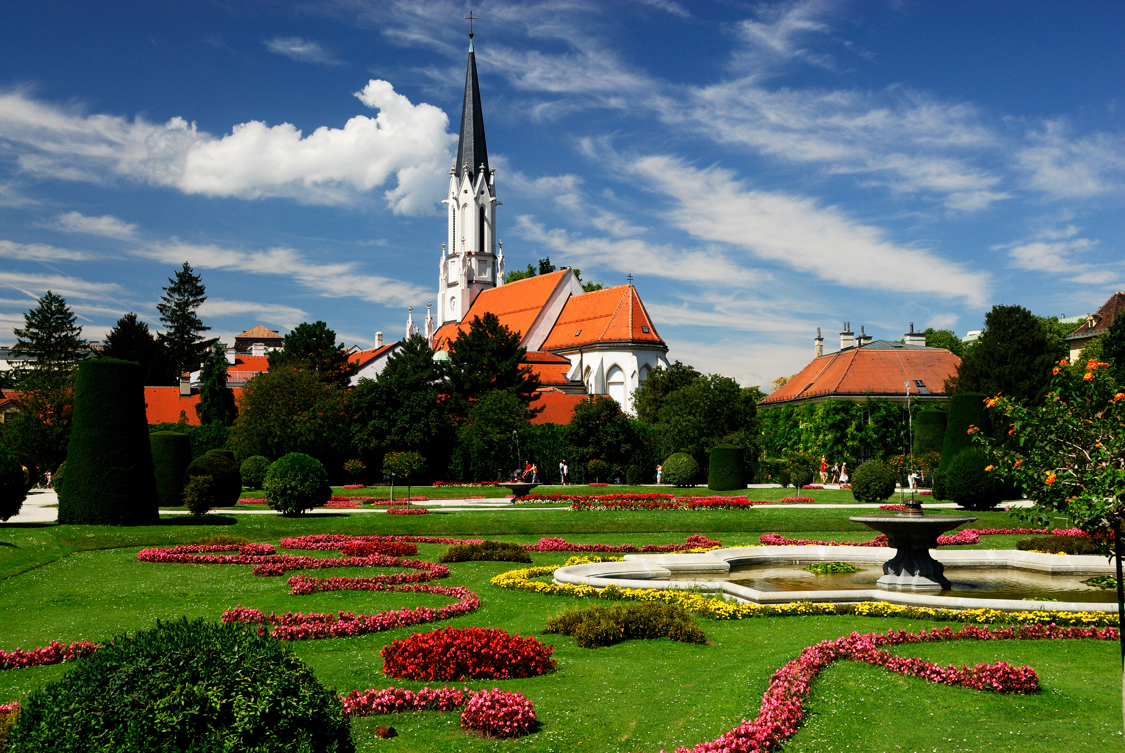 Hietzinger Pfarrkirche, seen from Schönbrunner Schlosspark in Wien, Austria